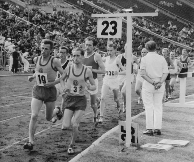 Bruno Bartholome, Günter Havenstein Zentralbild Koch Sd-Fr 23.7.1960 Erster Titel für Bartholome Den ersten Titel bei den deutschen Leichtathletikmeisterschaften vom 22.-24.7.1960 im Zentralstadion in Leipzig holte sich Marathonspezialist Bruno Bartholome (ASK Vorwärts Berlin) vor seinem Klubkameraden Günter Havenstein im 10.000 m Lauf. UBz: Im Vordergrund Bruno Bartholome (Nr. 3) und Havenstein.